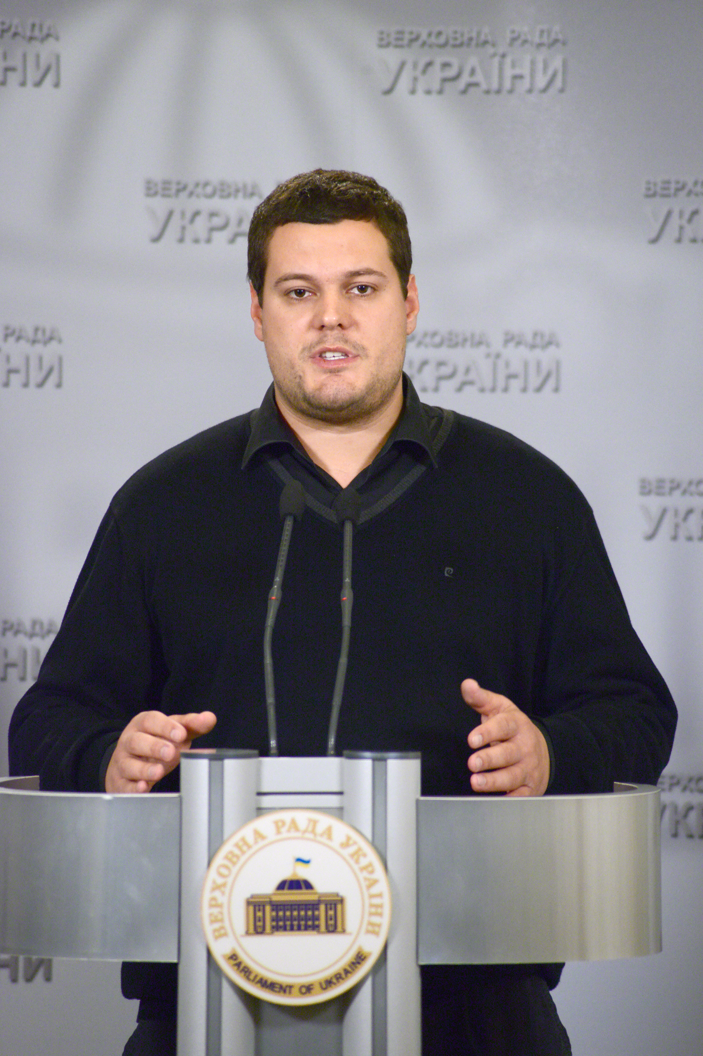 ВЕРХОВНА РАДА УКРАЇНИ 2015 фотограф Вадим Чуприна